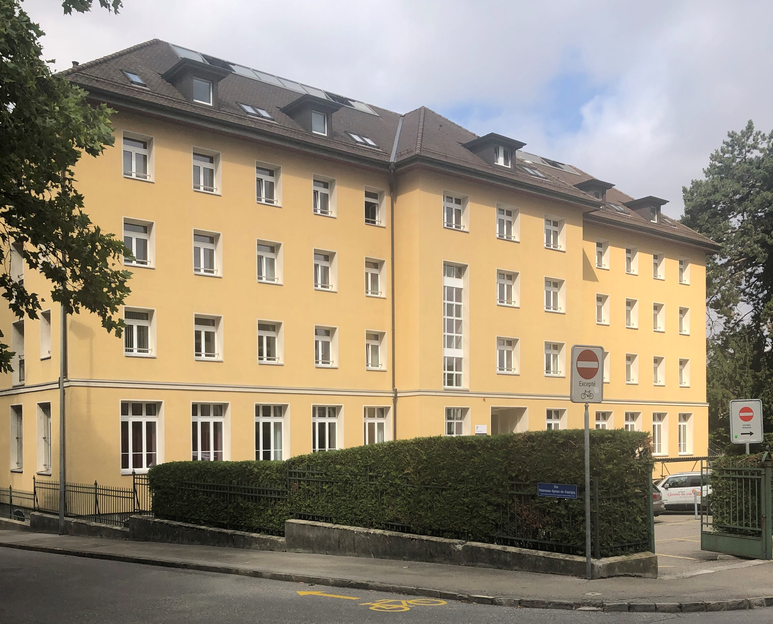 Universität Freiburg (Schweiz): Regina Mundi Departement für Psychologie